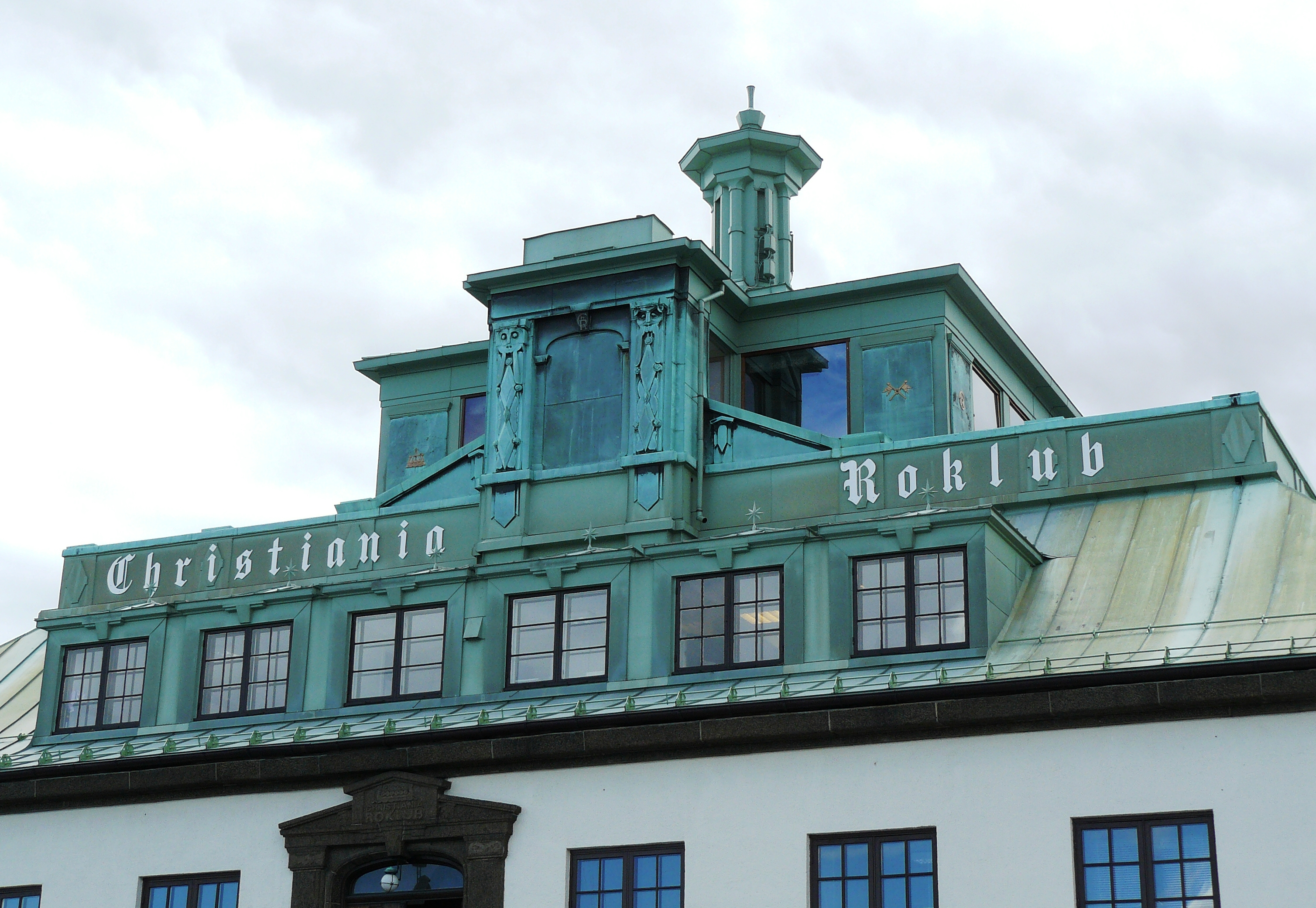 Kongen, building in Frogner, Oslo